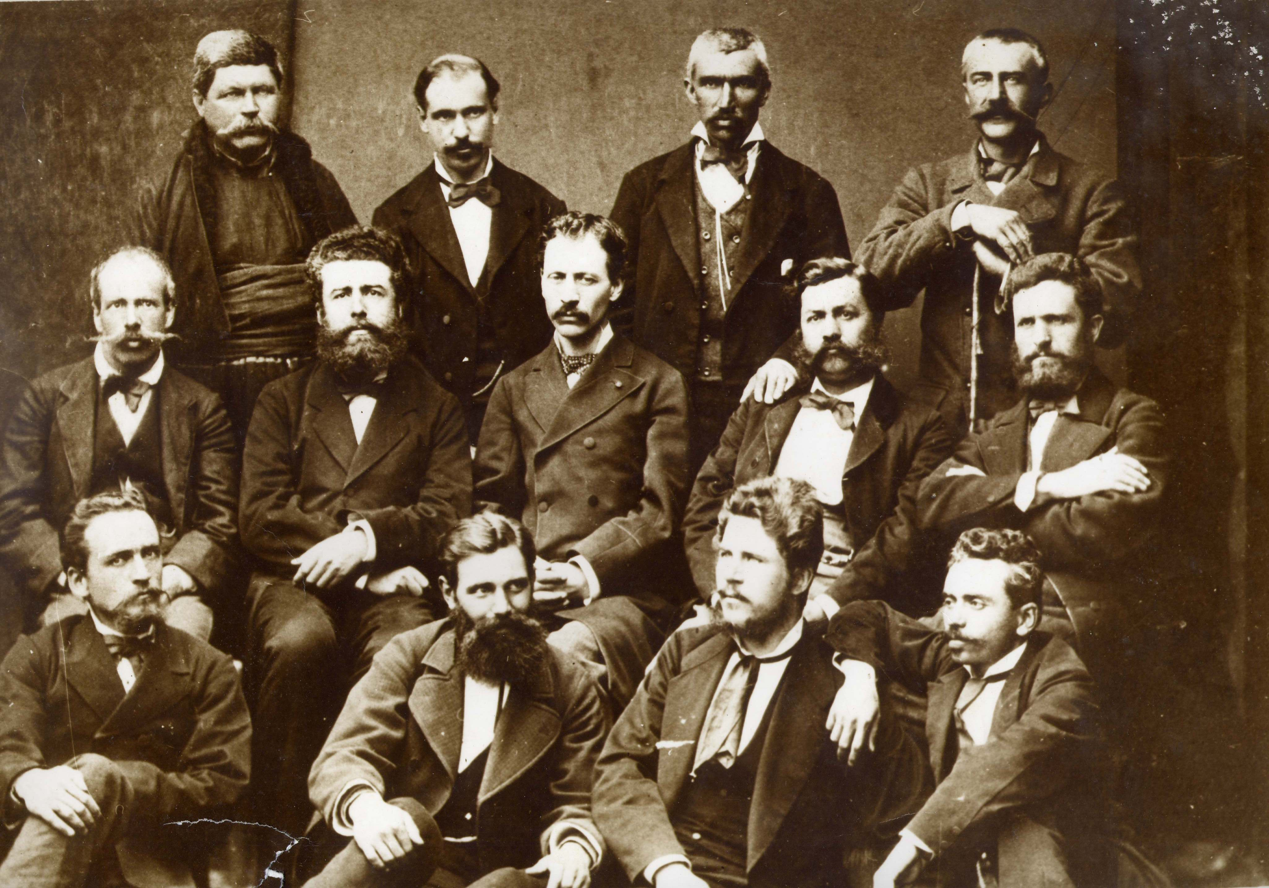 Die Volksabgeordneten aus dem Gebiet Lovetsch an der Gründungsverammlung in Tarnovo, 1879